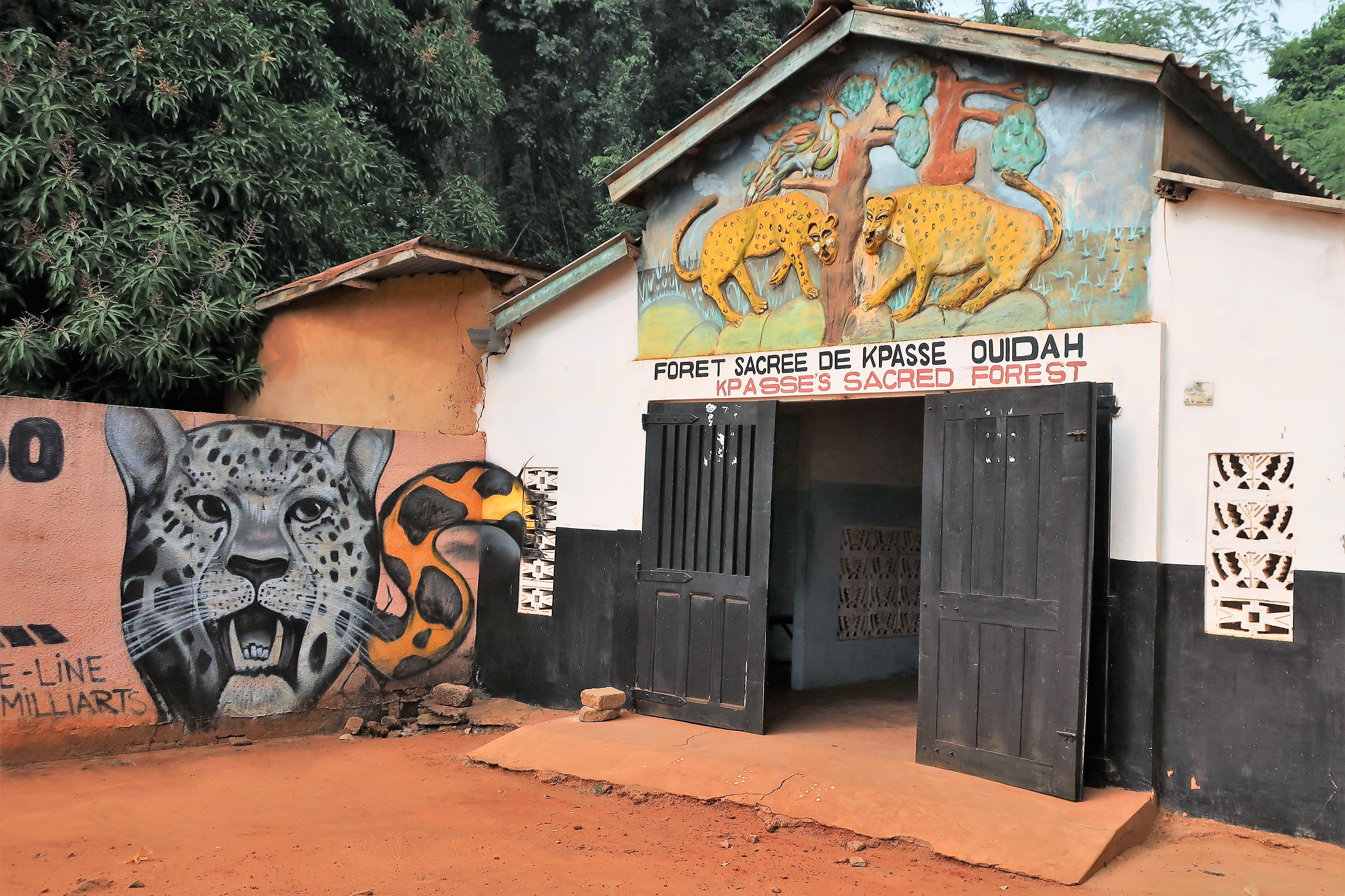 Portti pyhään metsään Ouidahissa Beninissä tammikuussa 2018